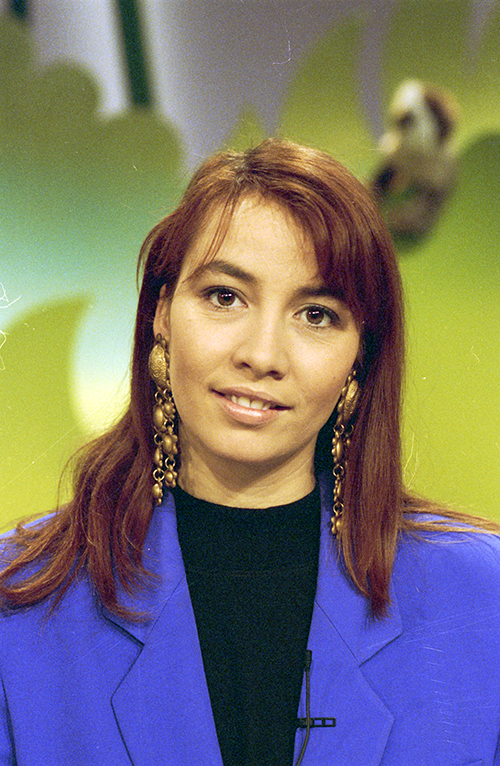 Nada van Nie